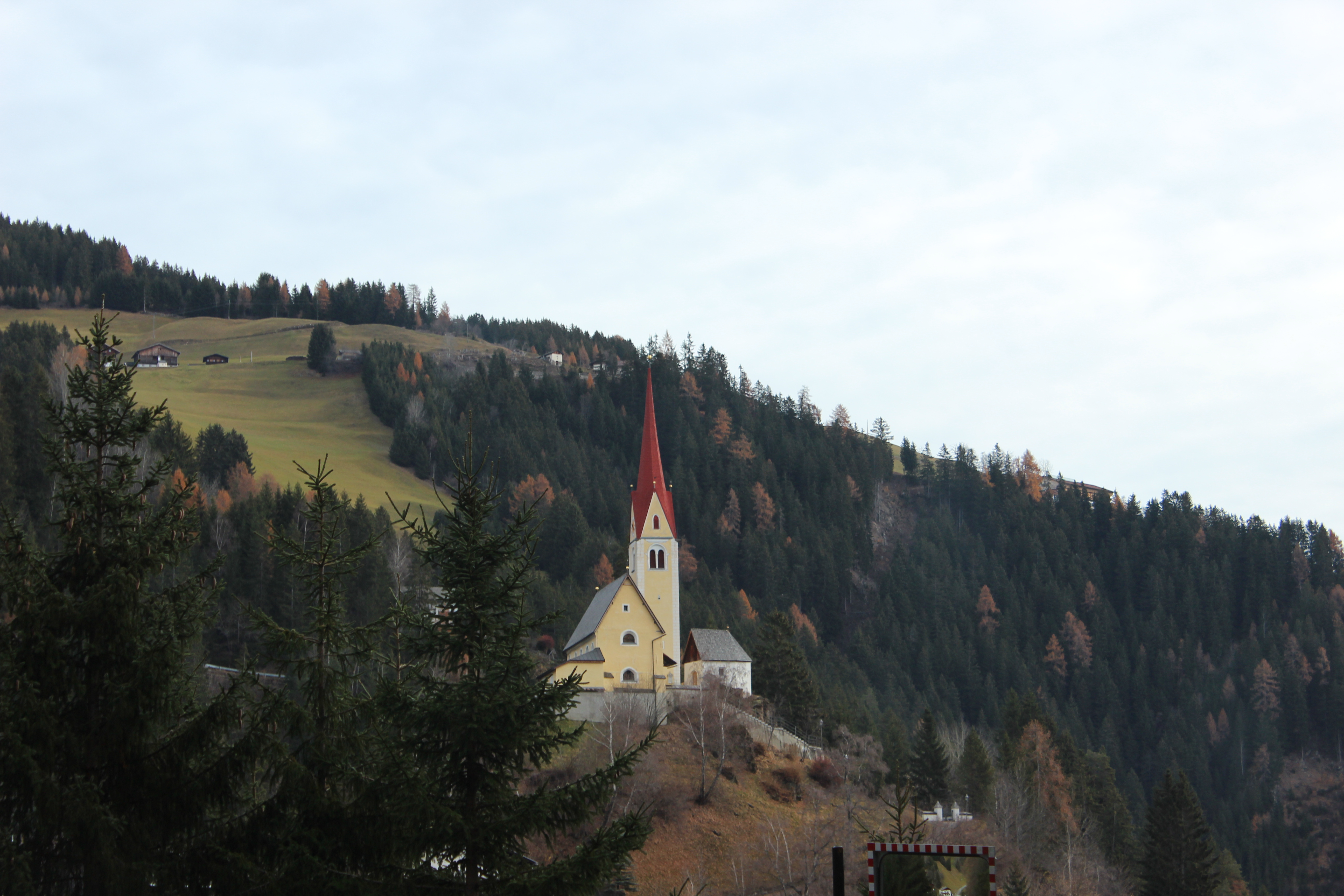 Kath. Pfarrkirche St. Justina in Assling, Österreich.